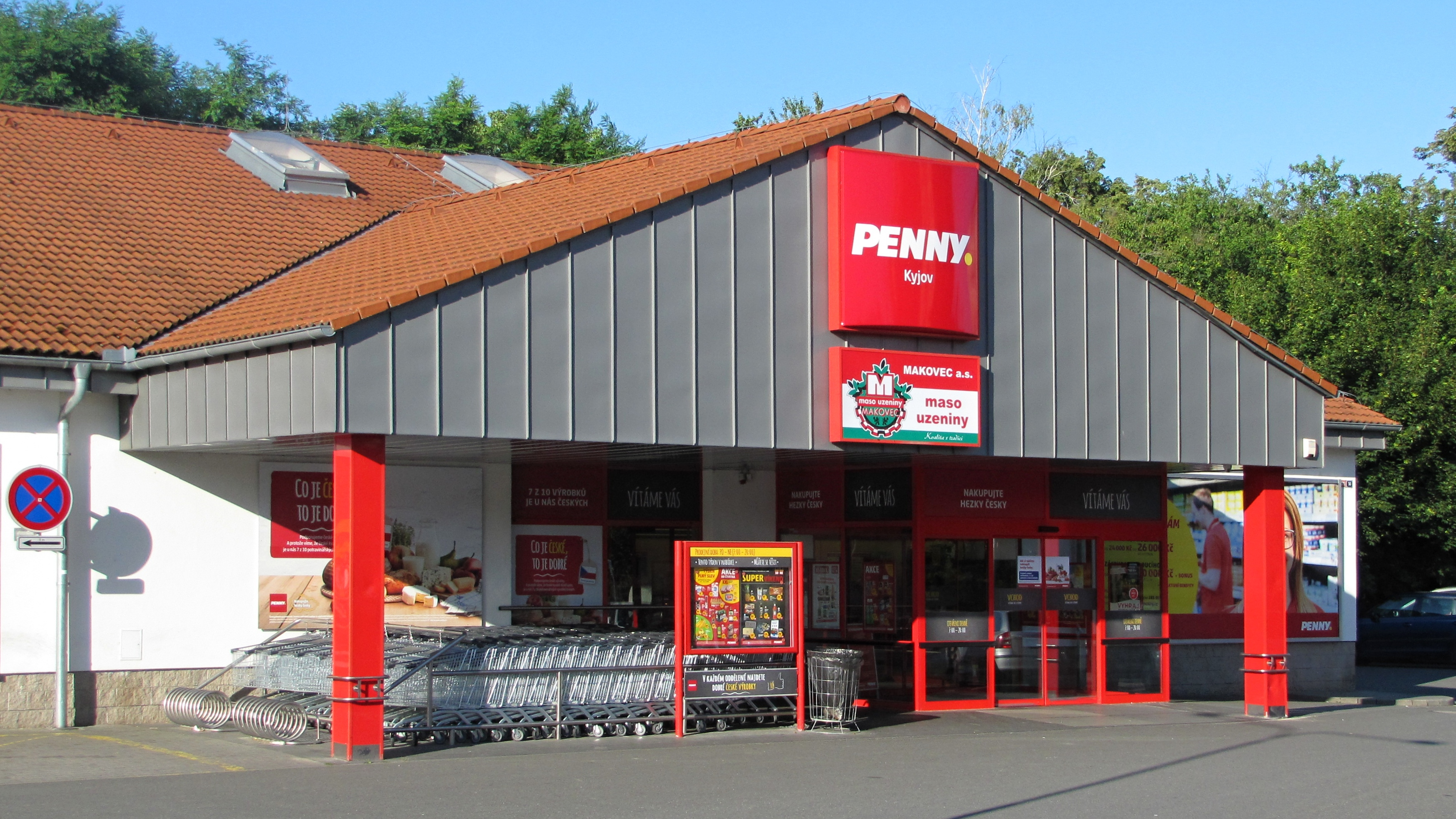 Penny Market na Brandlově ulici v Kyjově